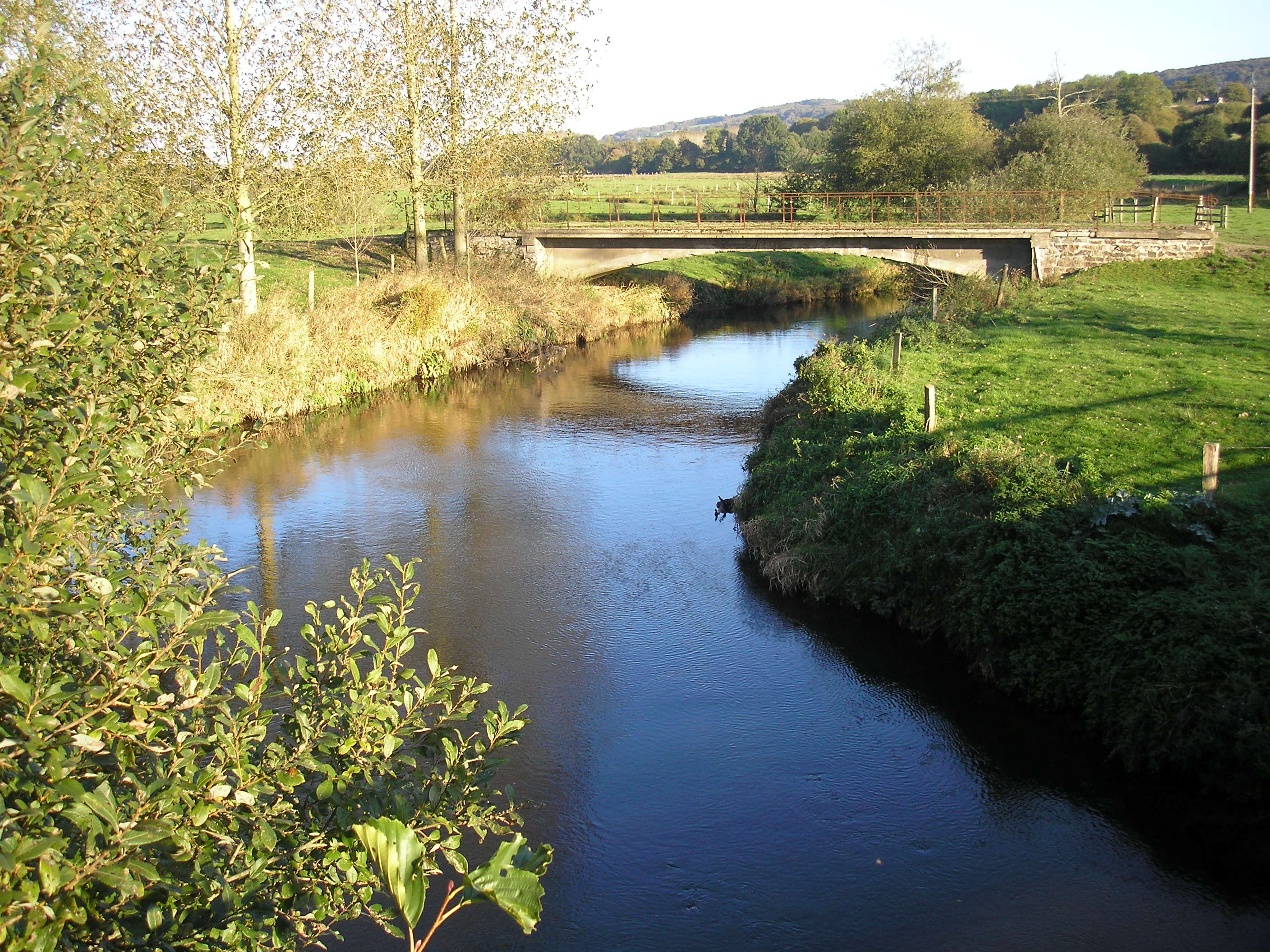 La Sée entre Tirepied, à gauche, et La Gohannière, à droite (Normandie, France).